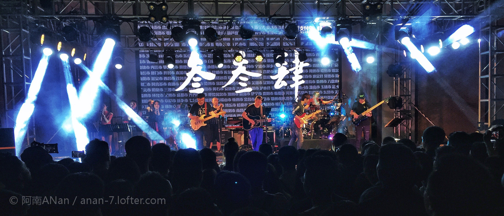 中文（中国大陆）: 2018年3月21日 “叁叁肆计划”巡演 云南德宏站